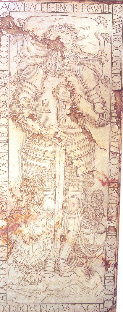 Lápida ÁLVARO OBERTOS DE VALETO